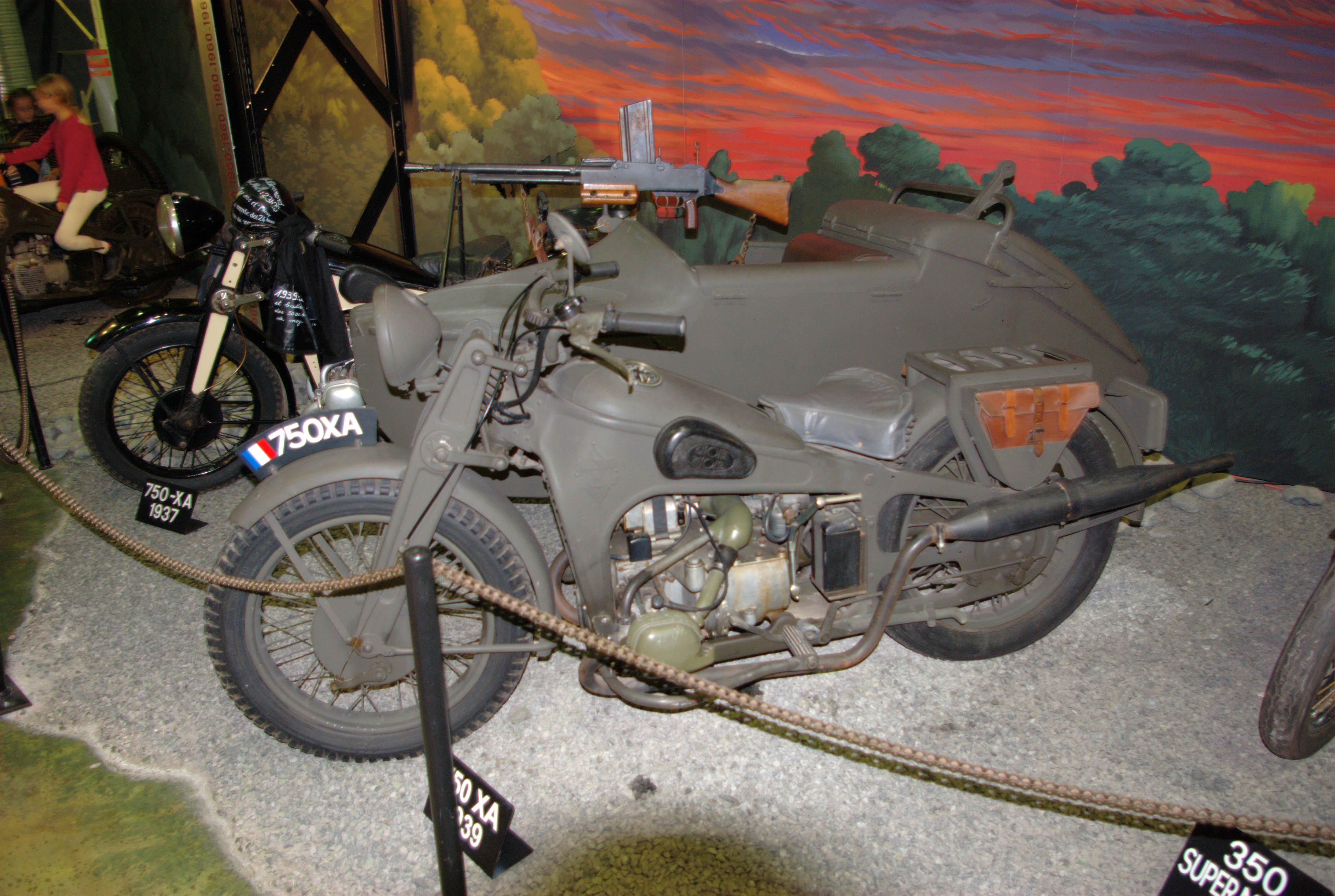 Side-car Gnome & Rhône du Musée Safran.